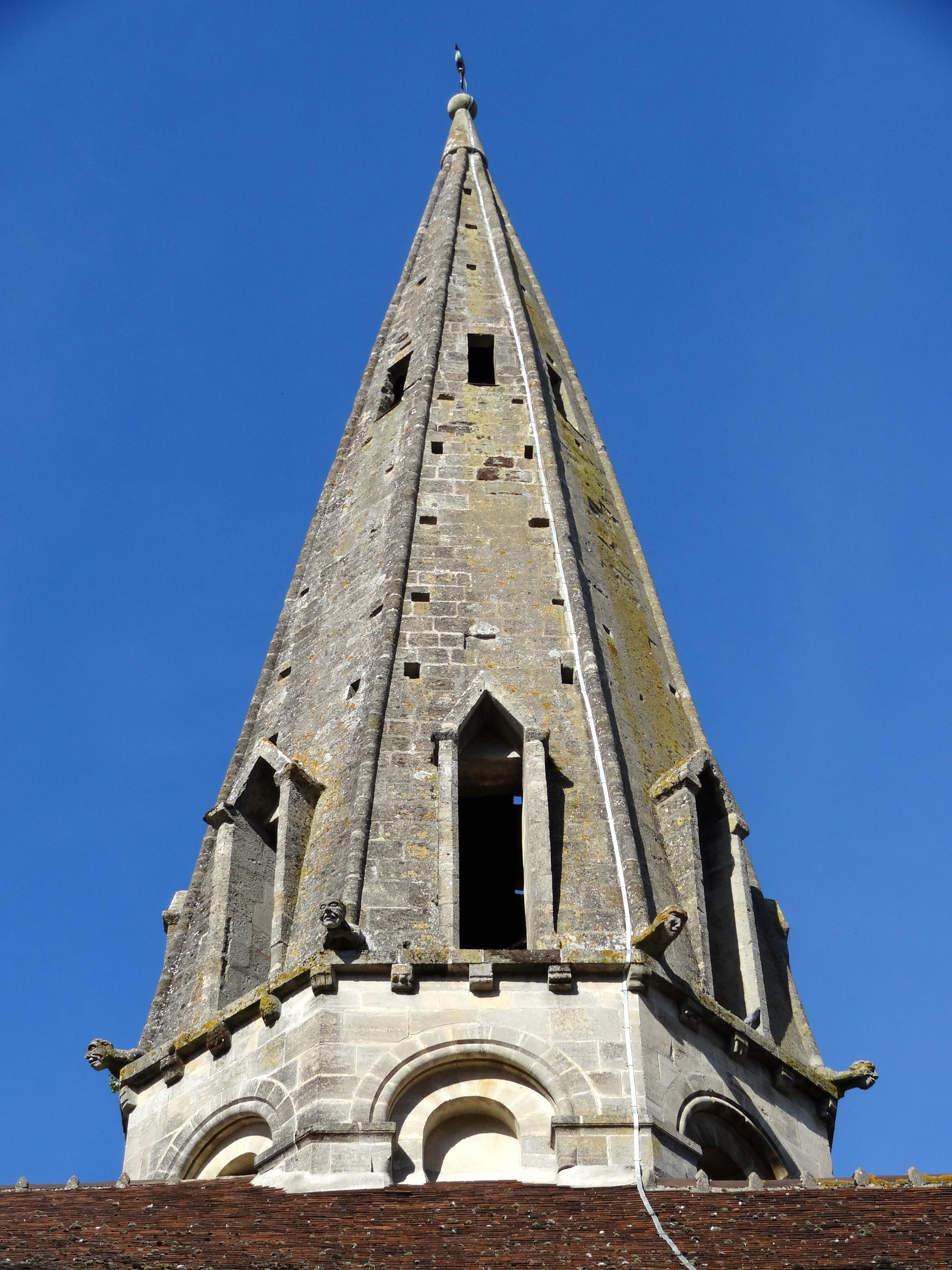 Église Notre-Dame de Jambville - voir titre.